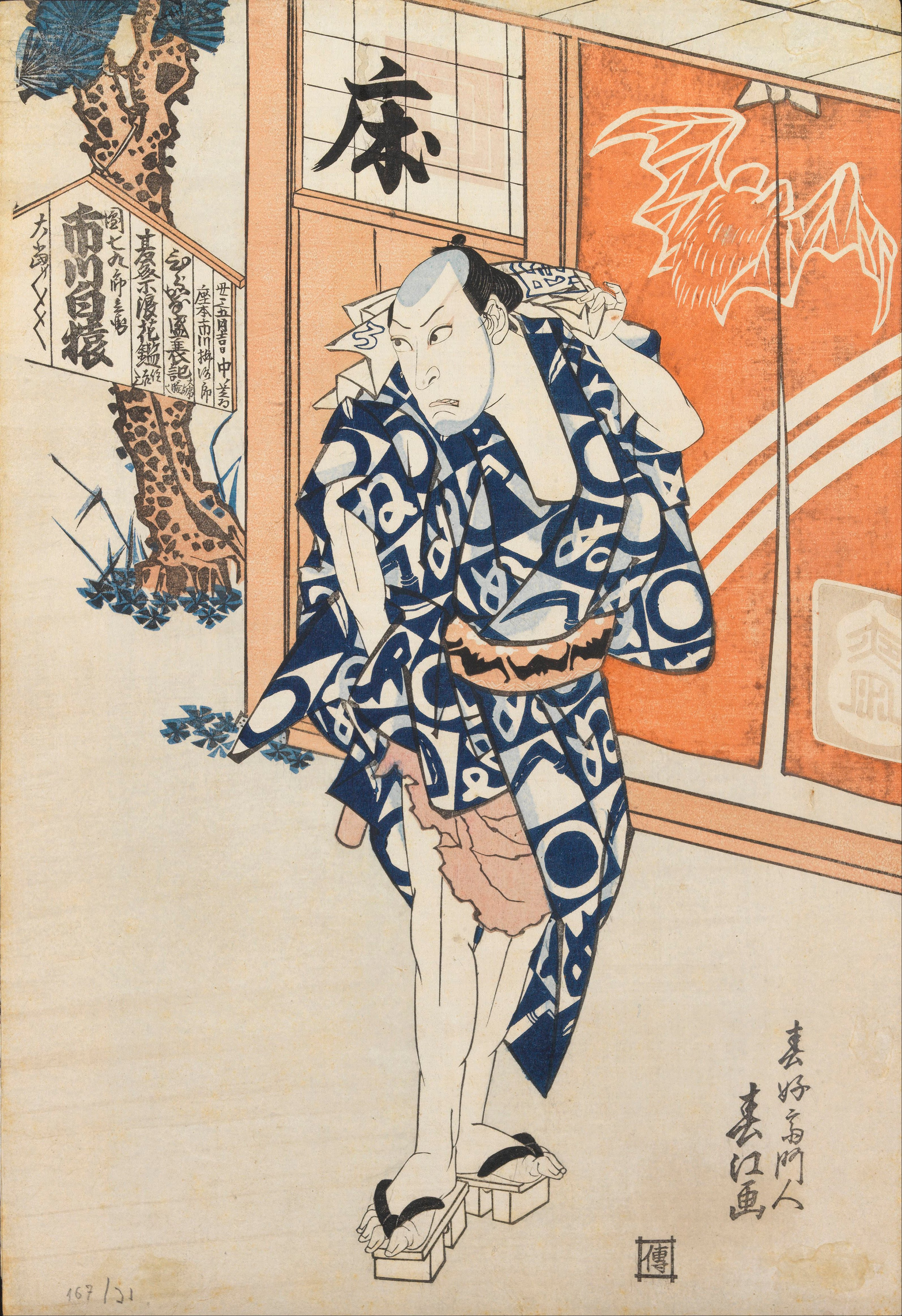 Ichikawa Hakuen II (Ichikawa Danjūrō VII) as Saeda Masaemon